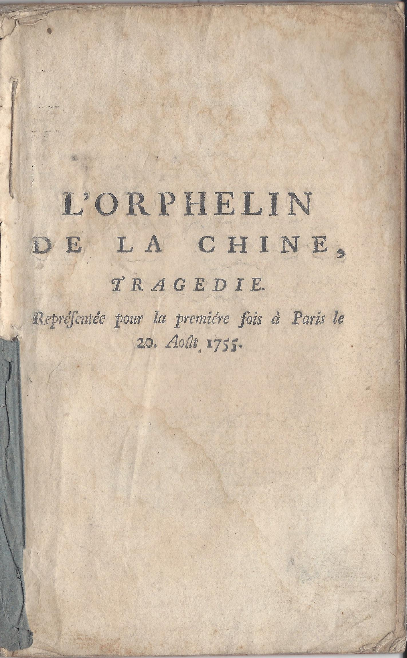 Titelseite von Voltaires: L'Orphelin de la Chine, Cramer Genf, Juli-August 1755